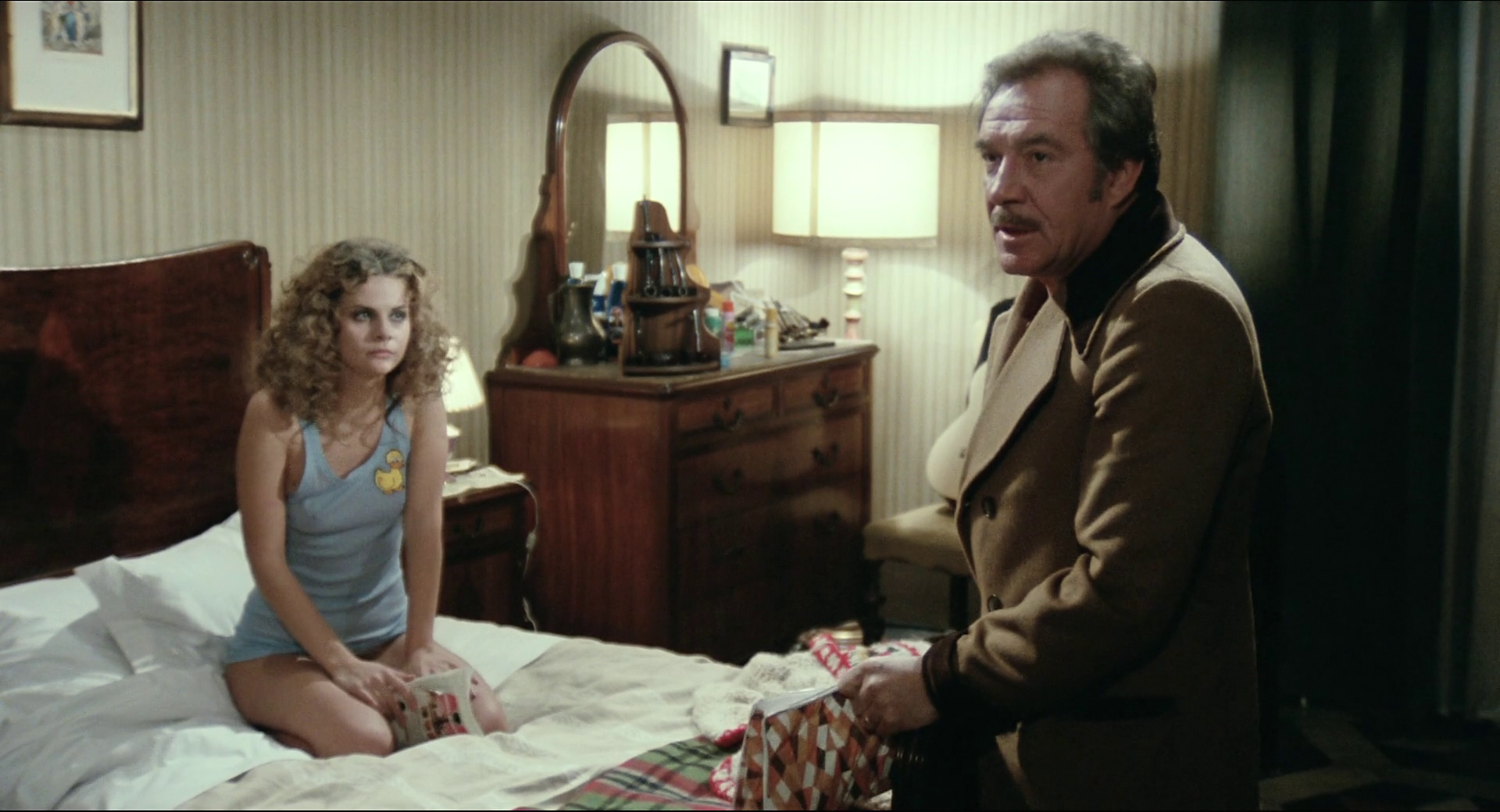 scena dal film Amici miei